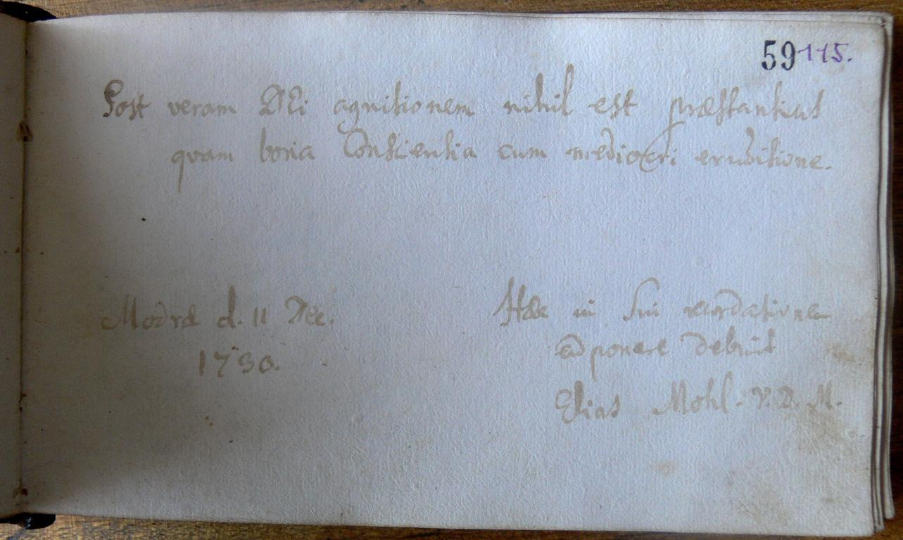 Mohl kézírás 1730